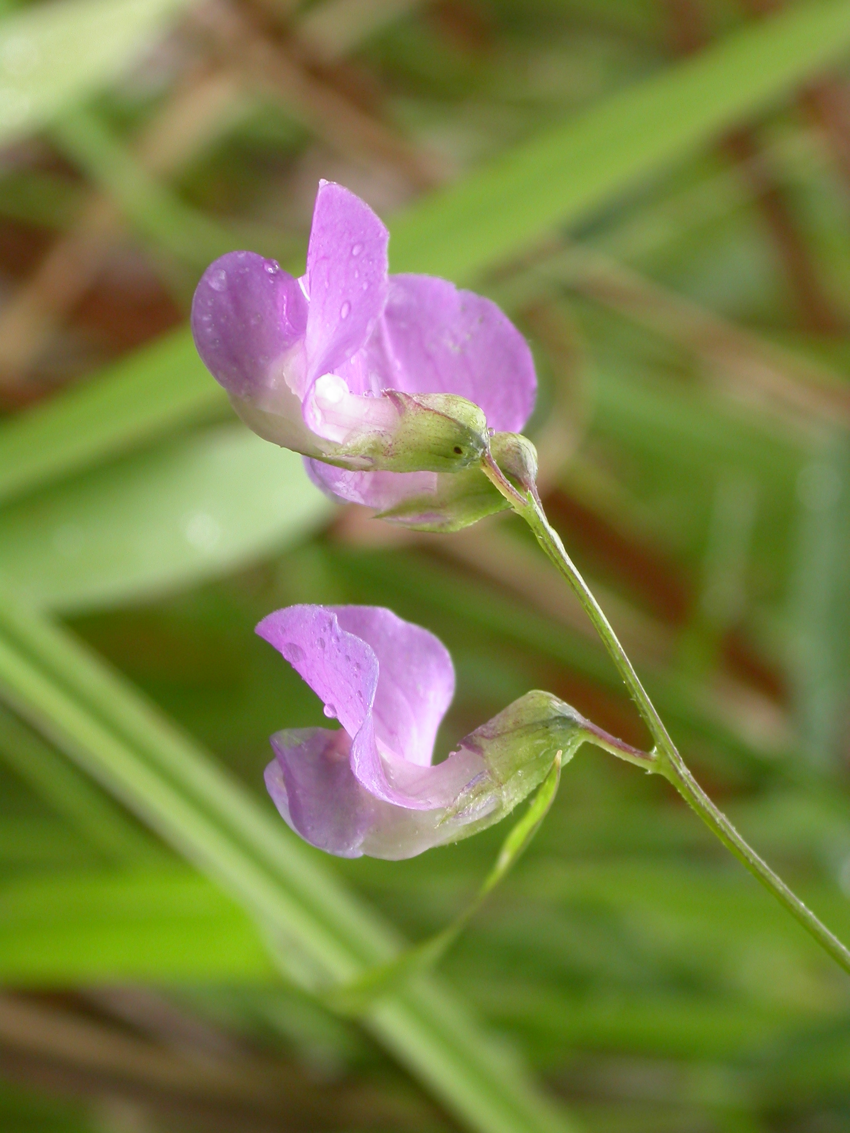 Lathyrus palustris Marais de Blangy-Tronville), France